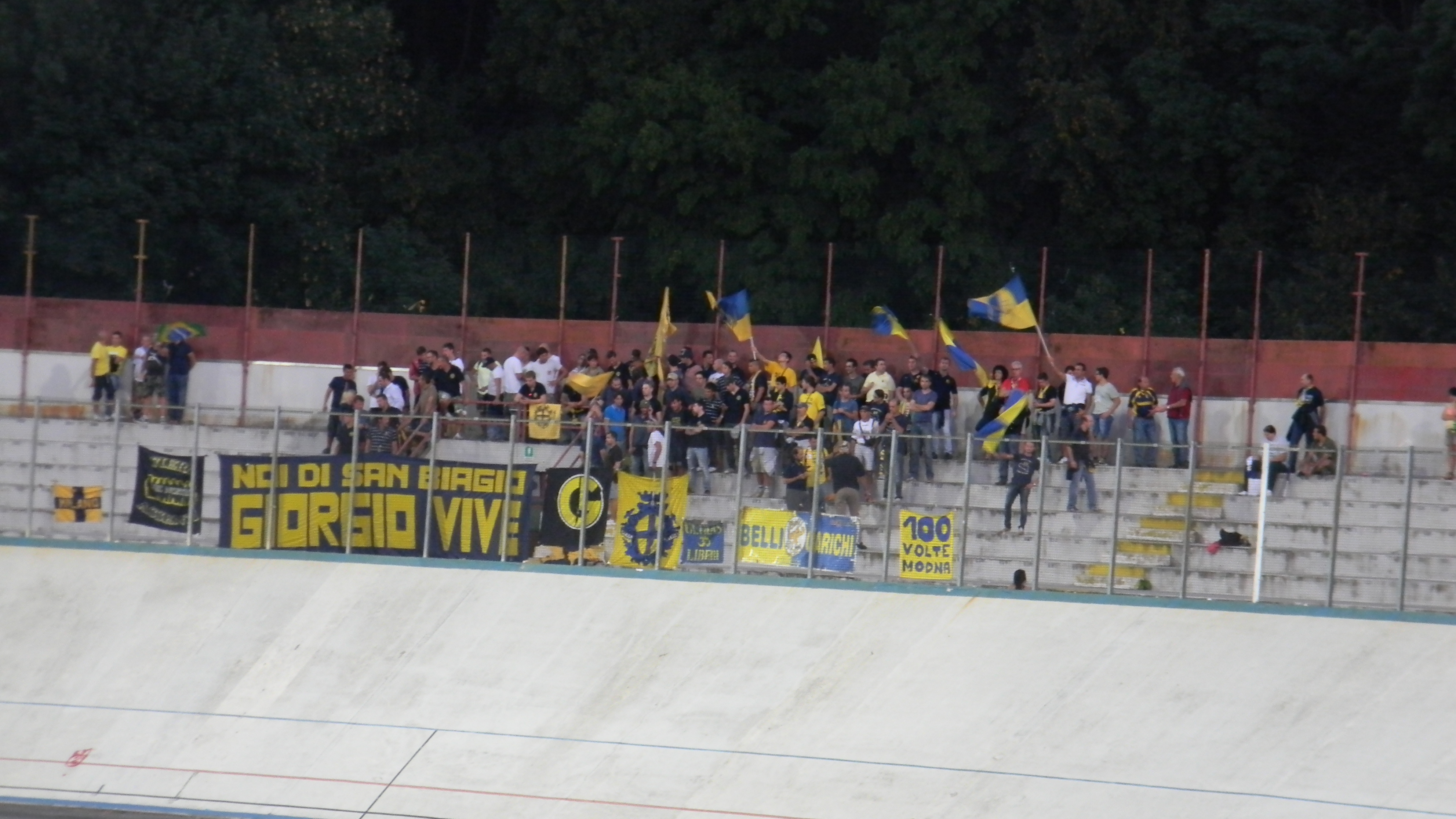 La Curva Montagnani in occasione dell'andata dei play-off di Serie B 2013-2014.